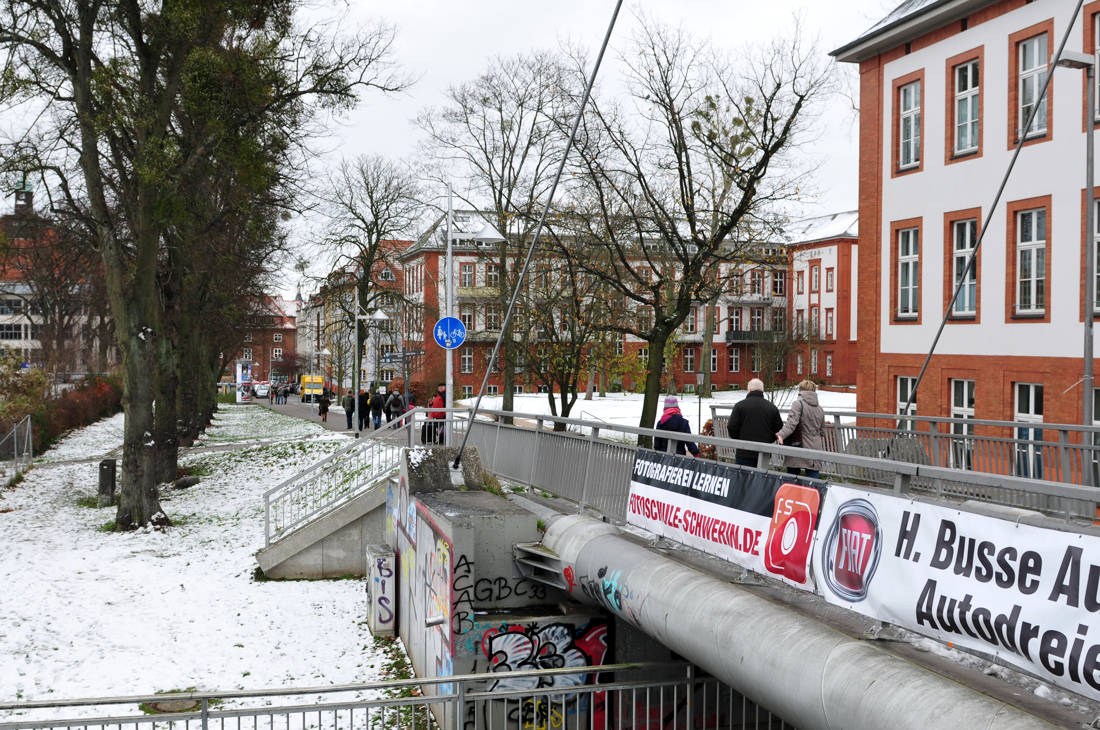 Brücke am Haltepunkt Schwerin Mitte, Lobedanzgang mit ehemaligem Lazarettgebäude auf der rechten Seite. Fußgänger auf dem Weg, den sie sich mit den Radfahrern teilen müssen.